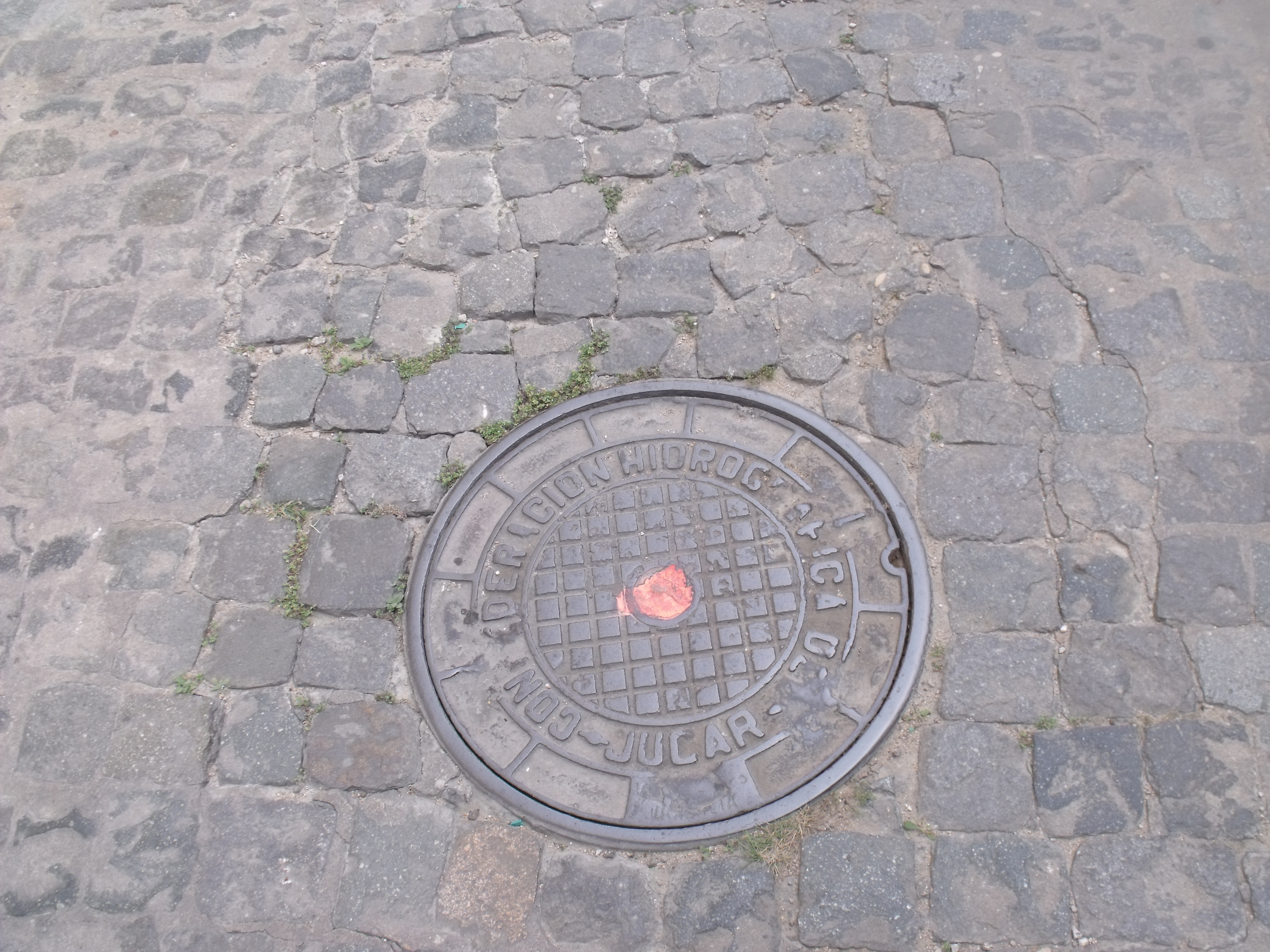 Trapa alcantarillado de la Confederación Hidrográfica del Júcar